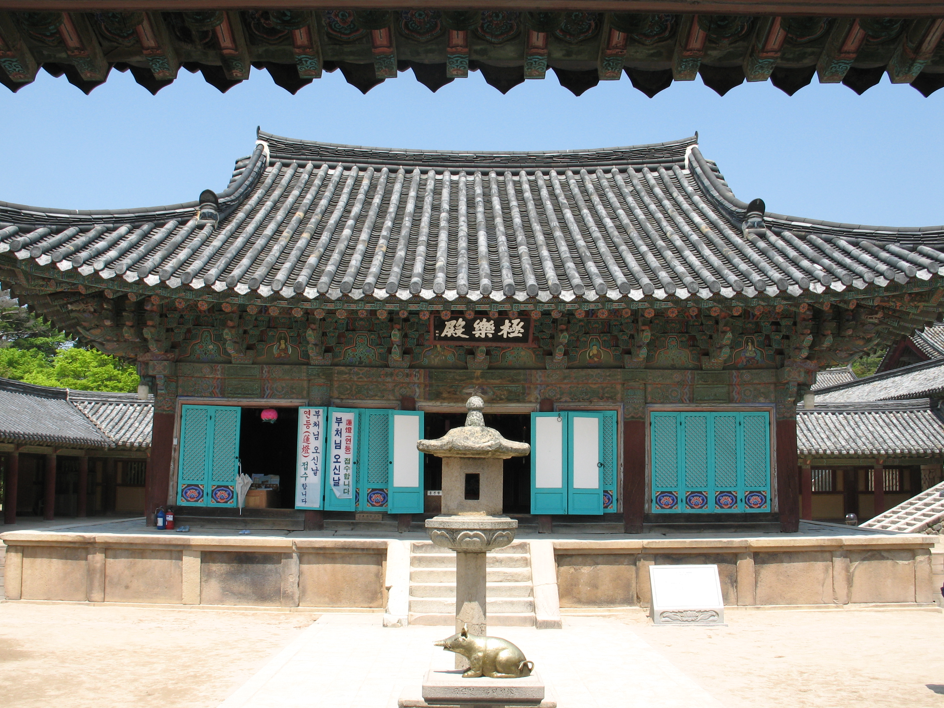 Geukrakjeon at Bulguksa, Gyeongju, South Korea.